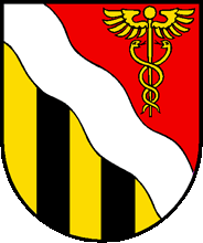 Wappen von Ennenda Kanton Glarus Schweiz